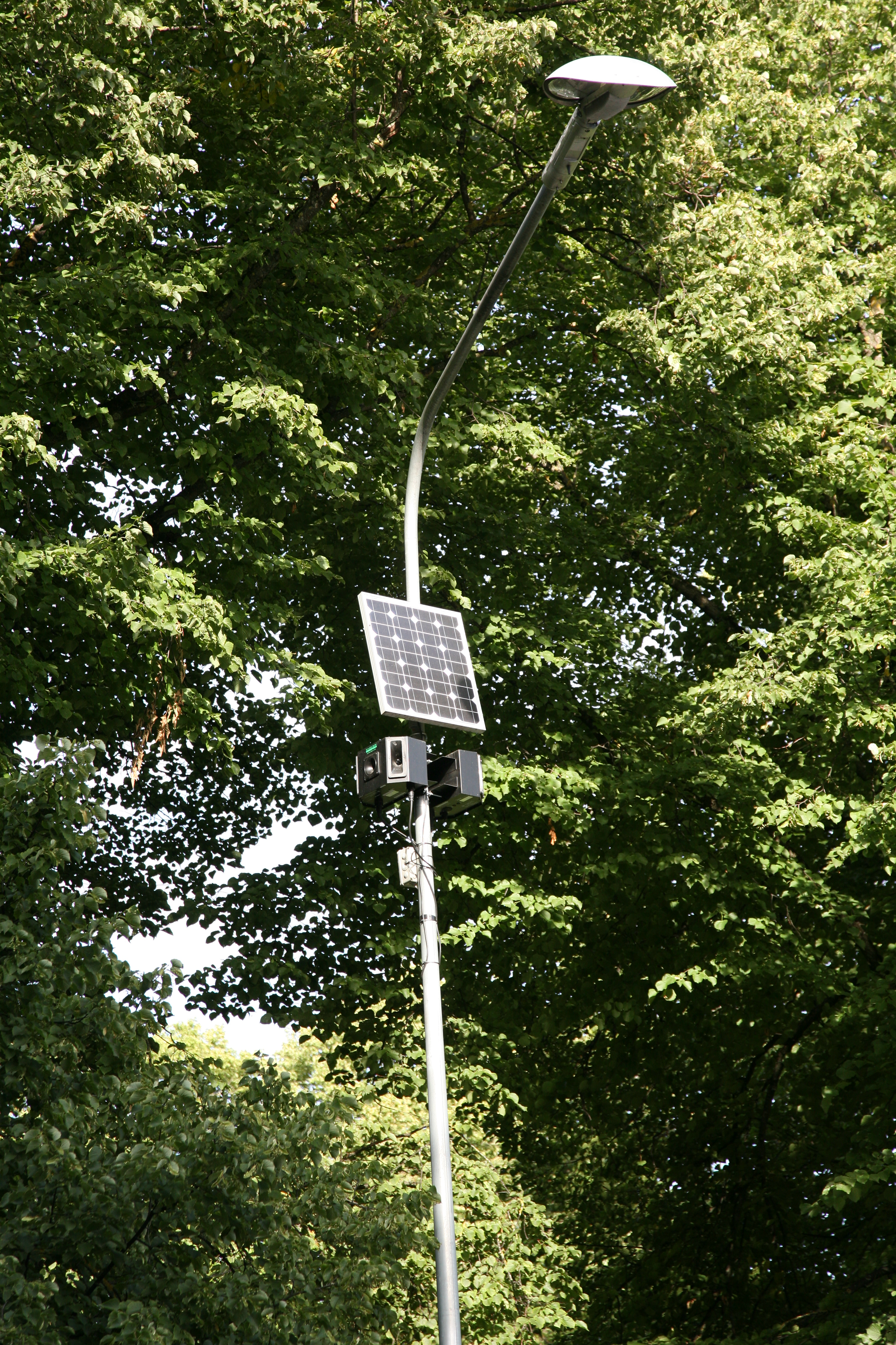 Linnupeleti Tartus Emajõe ääres, juuli 2015